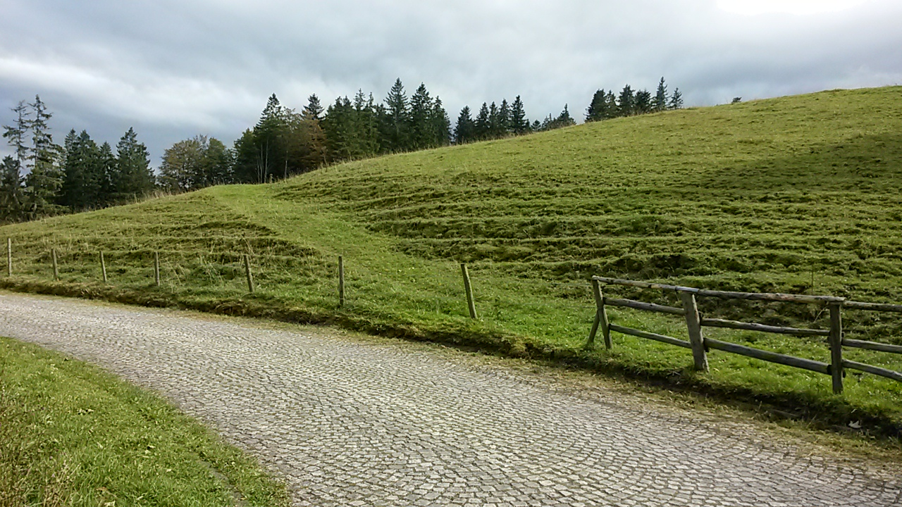 Straße und ehemaliger Zufahrtsweg zum SS-Berghaus des KZ-Außenlagers Dachau am Oberen Sudelfeld in der Nähe von Bayrischzell, Bayern, Deutschland, dessen Verlauf auch heute noch unter der Grasnarbe zu erkennen ist. Über 150 KZ-Häftlinge (Jehovas Zeugen) mussten hier Zwangsarbeit verrichten und unter anderem diese Straßen und Wege anlegen und pflastern. Zu sehen ist heute noch das Originalpflaster aus der NS-Zeit. Foto aufgenommen am 2015-09-20.